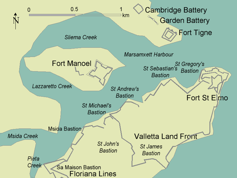 Marsamxett Harbour mit den Festungen